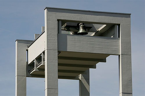 Evang.-ref. Pauluskirche